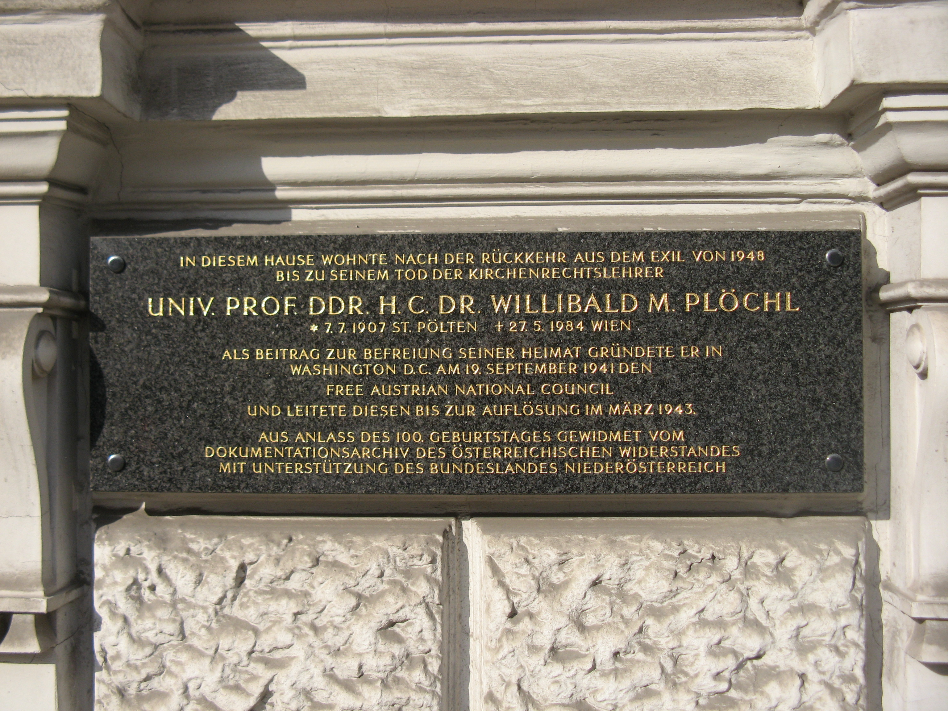 Gedenktafel für Willibald Plöchl, Universitätsstraße 10, Wien-Alsergrund